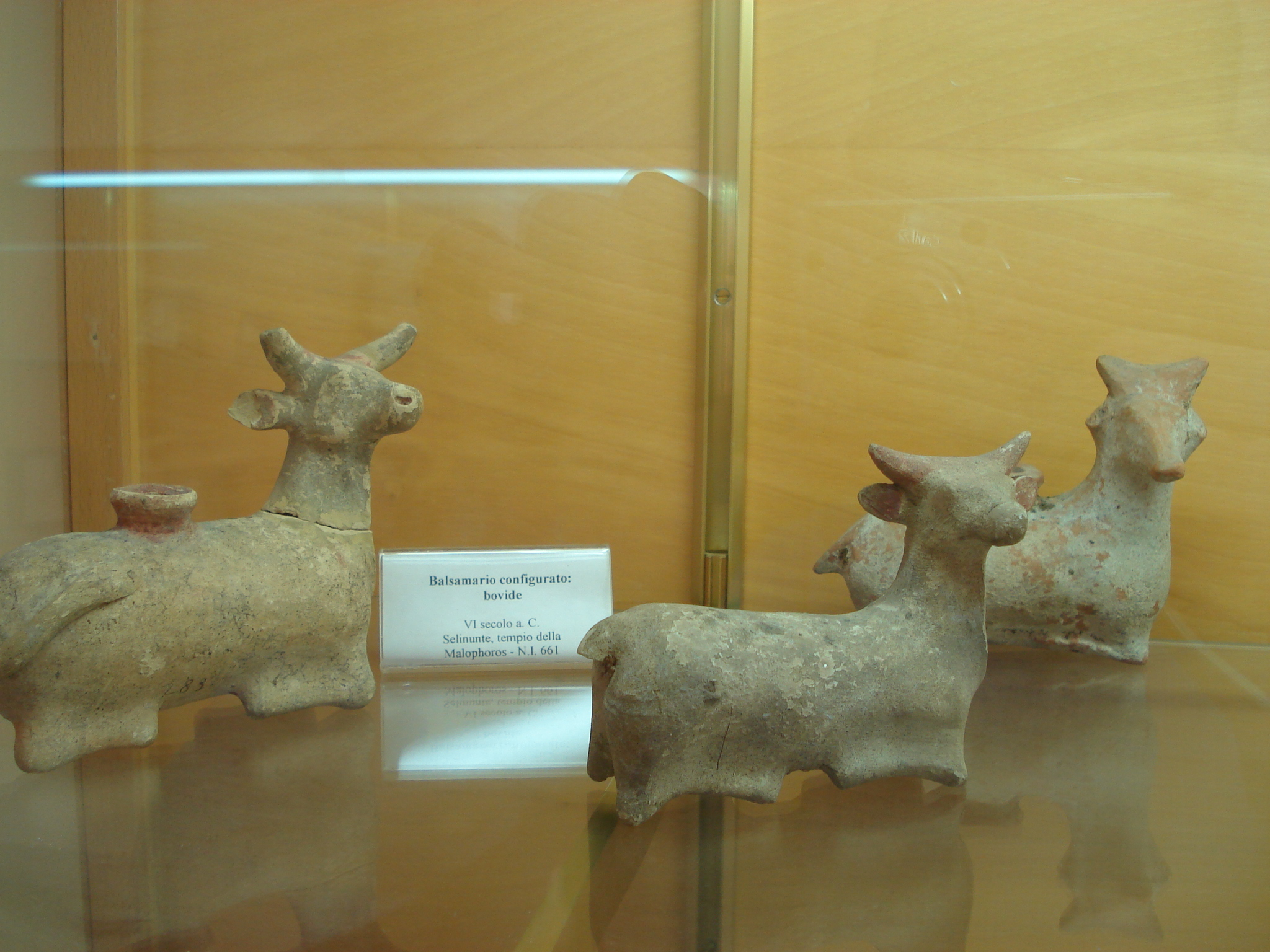 Buoi. Balsamari (vasetti) in terracotta greci del sec. VI a.C., da Selinunte (Sicilia). Conservano qualche lieve traccia della policromia originale. Ora al Museo archeologico regionale di Palermo, 28 settembre 2006. Foto di Giovanni Dall'Orto.